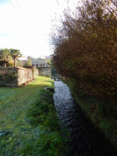 Río dos Pelamios. Caraña de Abaixo, Tiobre, Betanzos